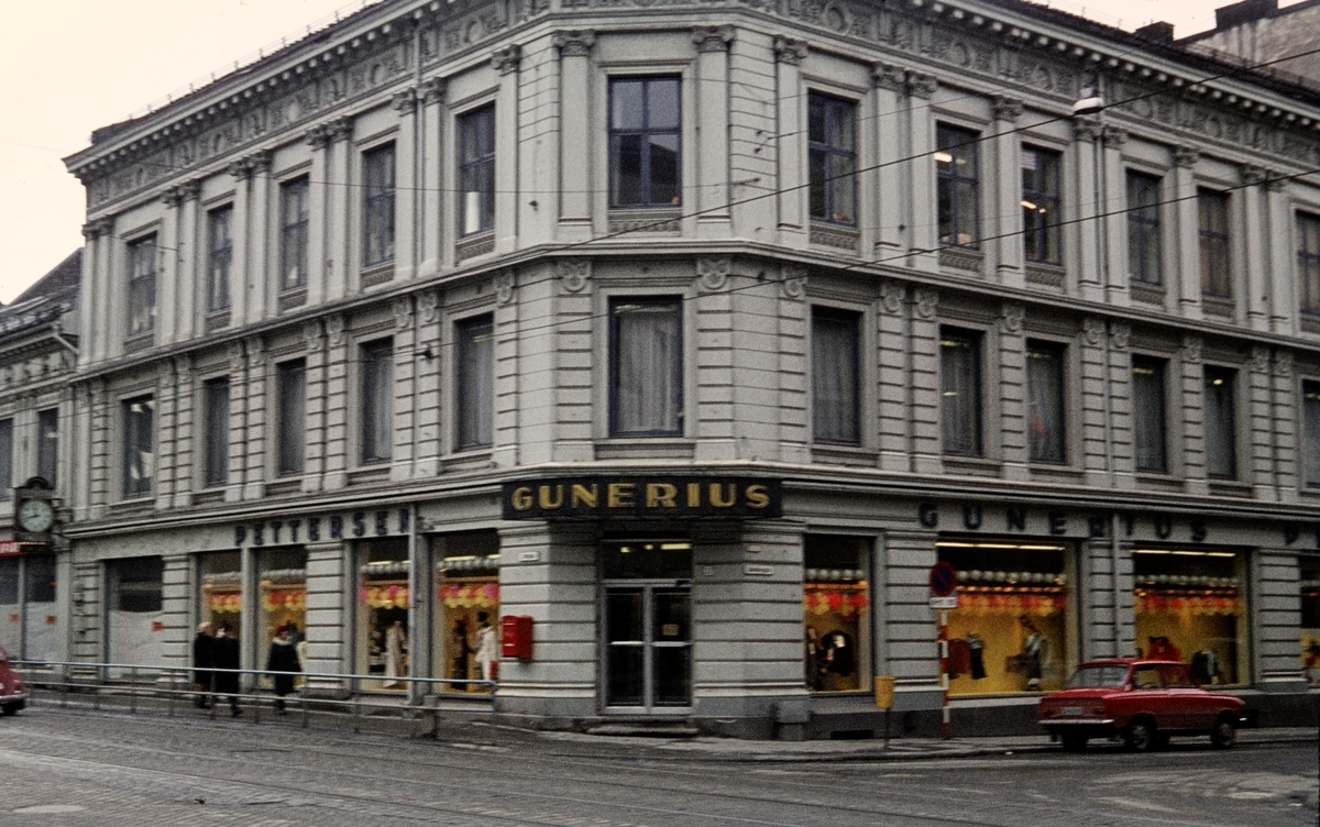 Gunerius Pettersen magasin (ark. Anselm Liljeström, 1879; revet ca. 1970), Storgata 32 (samt 34 i utkant av bildet). Fra Byhistorisk samling hos Oslo Museum.